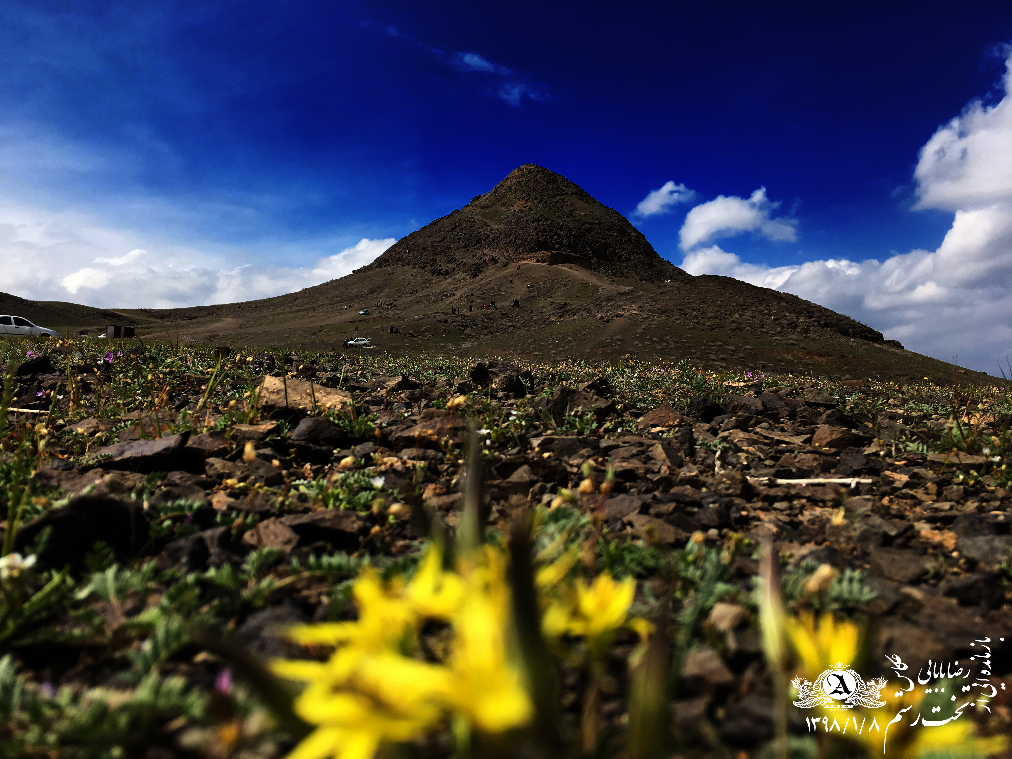 takht rostam2